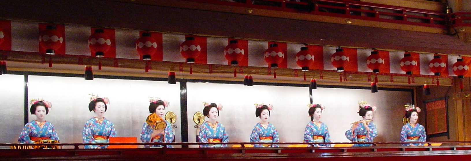 Maiko at Miyako Odori play in Kyoto